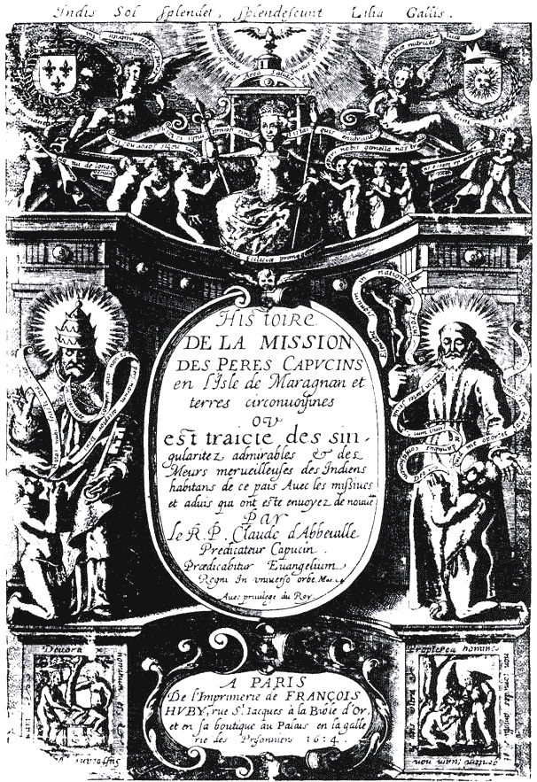 Frontispício da obra Histoire de la mission: Paris 1614. O frontispício é típico para a época: uma arquitectura simbólica, com uma alegoria da "Gallia ecclesiae primogenita" ("a França, a primeira filha da Igreja"), a igreja católica francesa, no alto. Ela é apresentada como Nossa Senhora que abre o seu casaco, um tipo da arte medieval (em alemão "Schutzmantelmadonna"). Há duas estátuas ao lado: São Francisco e São Pedro, ambas com selvagens que rezam. Em relevos são mostrados selvagens, que comem pedaços humanos moqueados, motivo que já conhecemos da tradição. No relevo à direita, há um Capuchinho com um índio sendo batizado. No alto, uma inscrição simbólica: "Indis Sol splendet, splendescunt Lilia Gallis" ("O sol das Indias brilha, os lírios francesas brilham") e dois escudos de armas, os lírios da França e o Sol como símbolo do Maranhão francês.